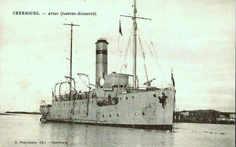 Le "Quentin Roosevelt (ex-Flamant) , aviso de la Marine nationale française lancé en 1913. A aussi servi par dans Section Belge de la Royal Navy (1940-44)